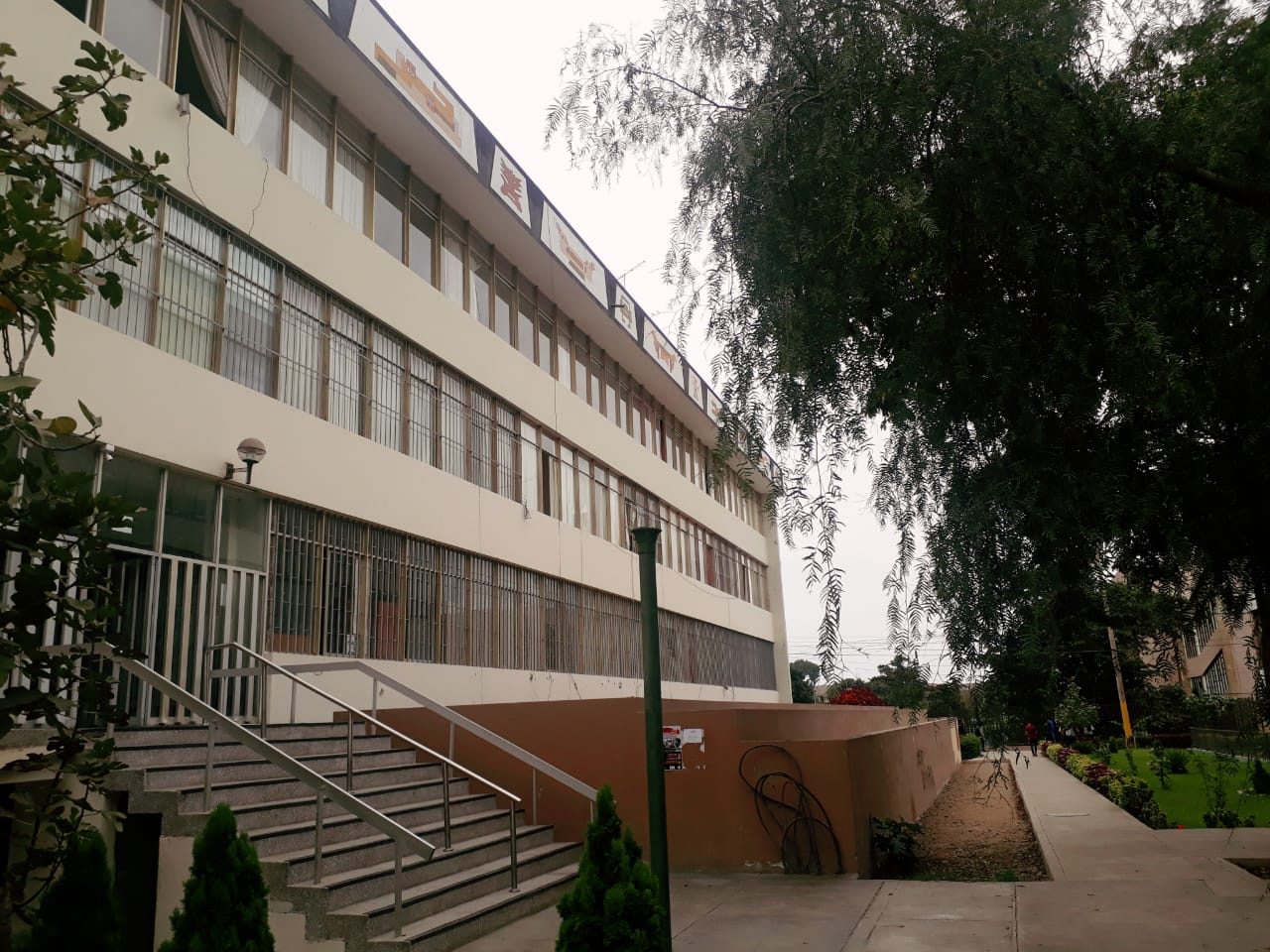 parte posterior de la Facultad de Derecho y Ciencia Política